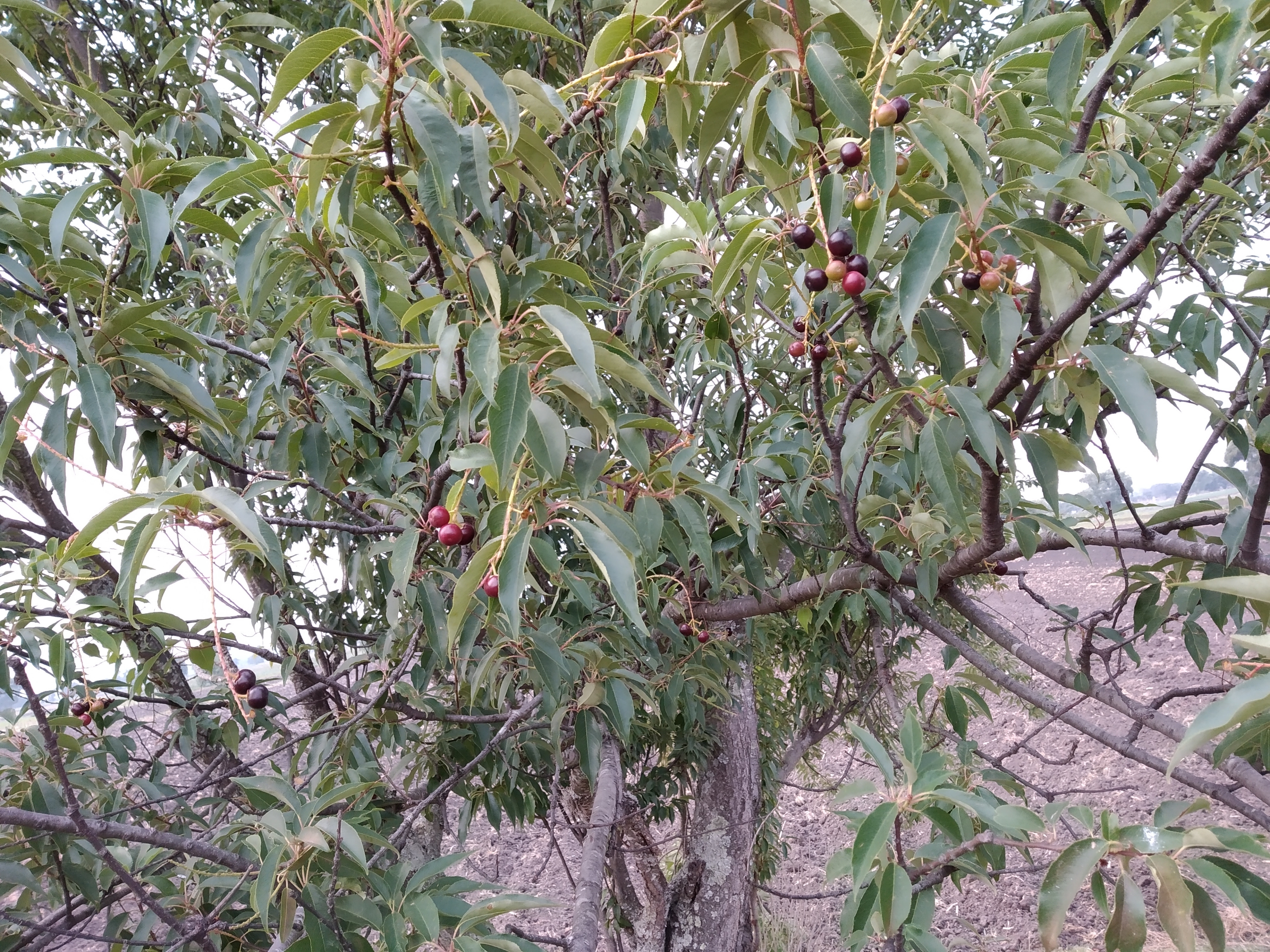 Prunus serotina, capulín.